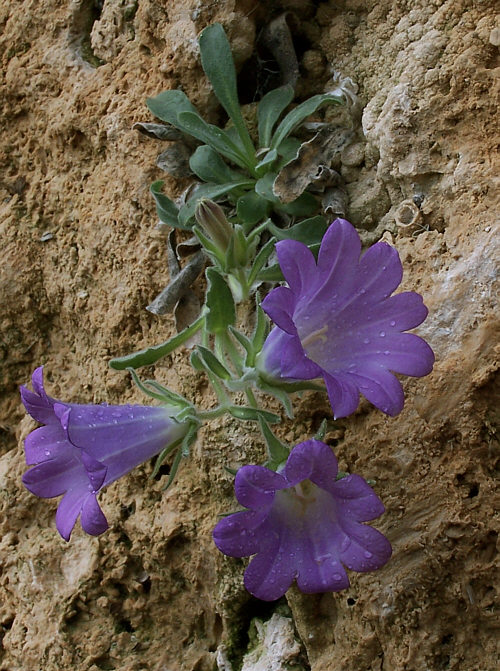 Plante vivace de 5 à 10 CM de l'est de la grèce sur éboulis et crevasses calcaire.